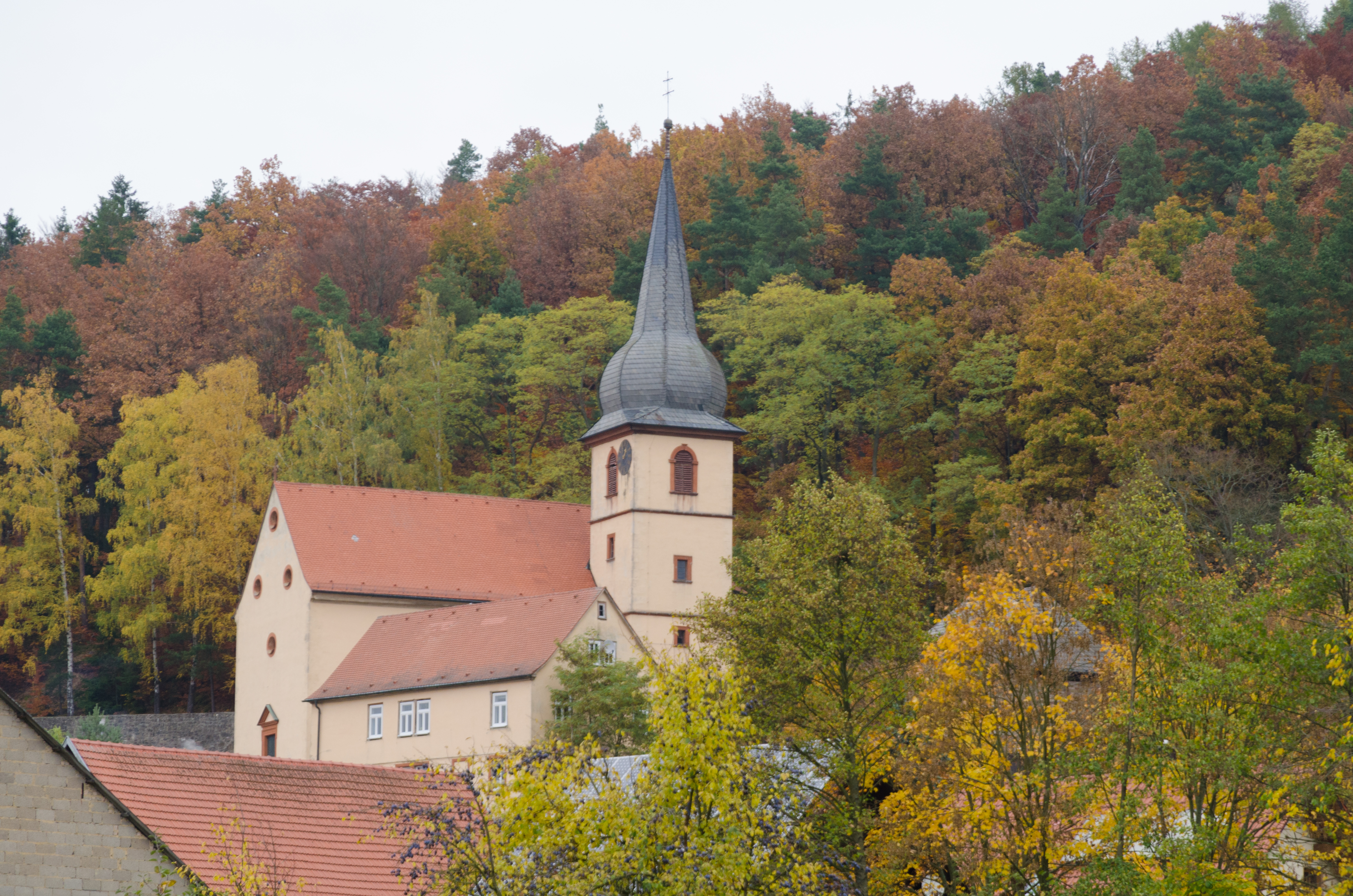 Fladungen, Heufurt, Katholische Filialkirche St Jakobus Major